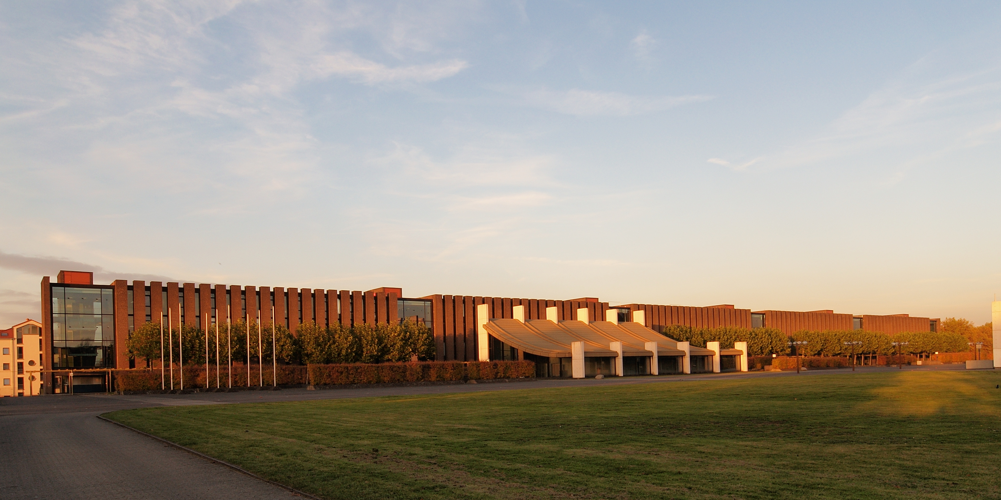 Rathaus in Castrop-Rauxel, Südseite, Architekt: Arne Jacobsen